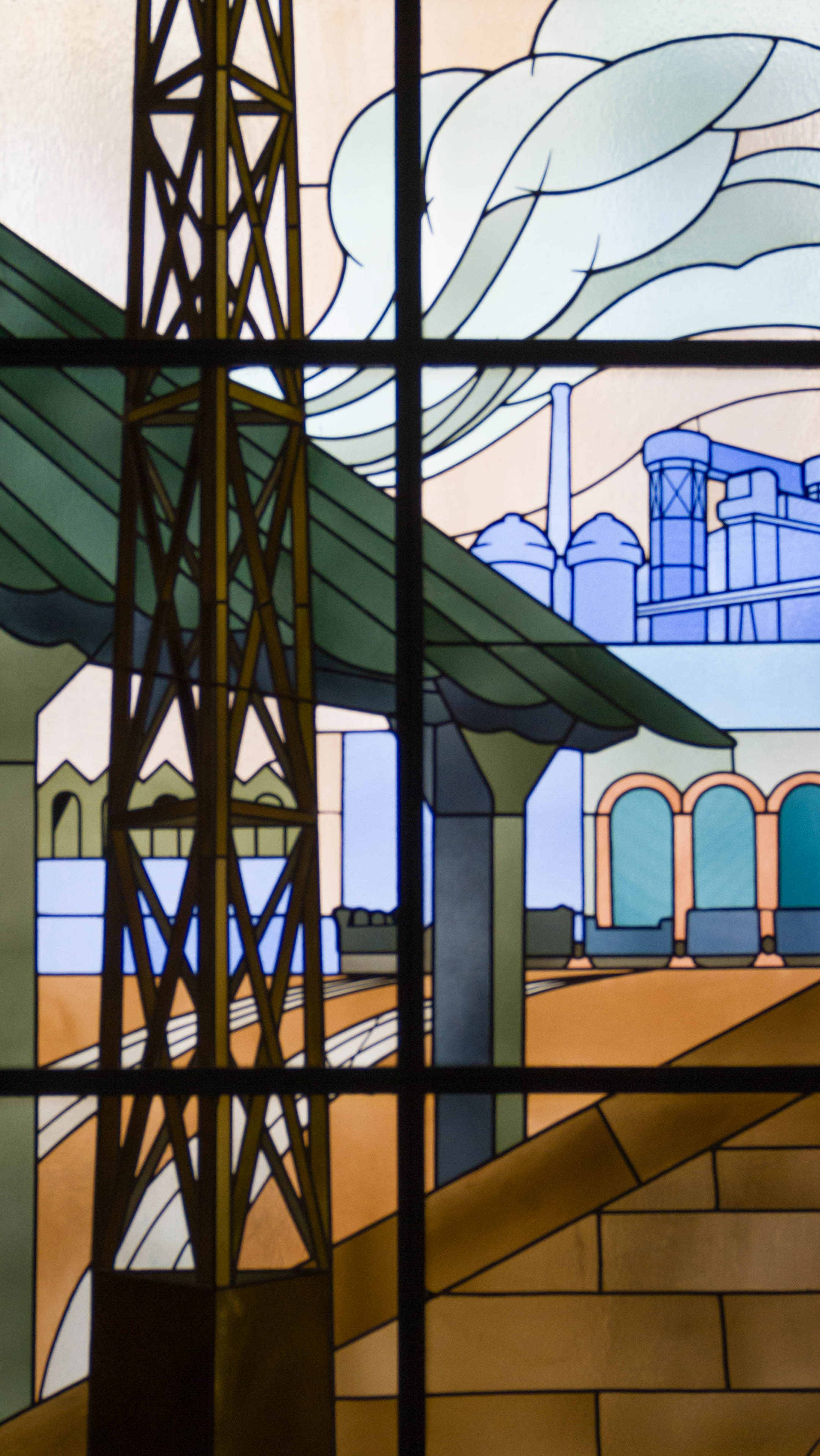 Vitraux Louis Majorelle, Grands Bureaux des Aciéries de Longwy